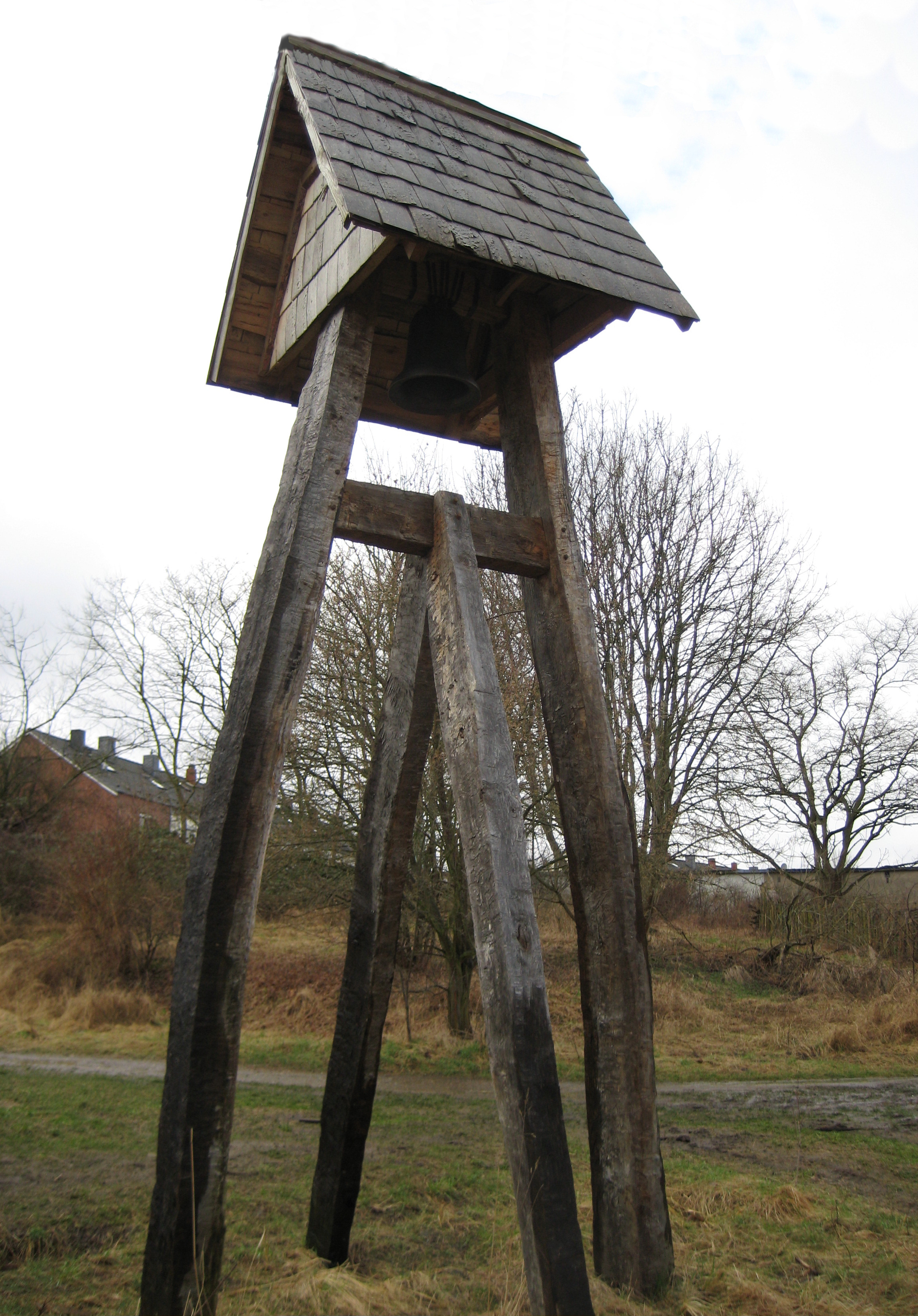 Glockenturm der Kirche St. Nikolai, Nachbau einer norwegischen Stabkirche von 1170